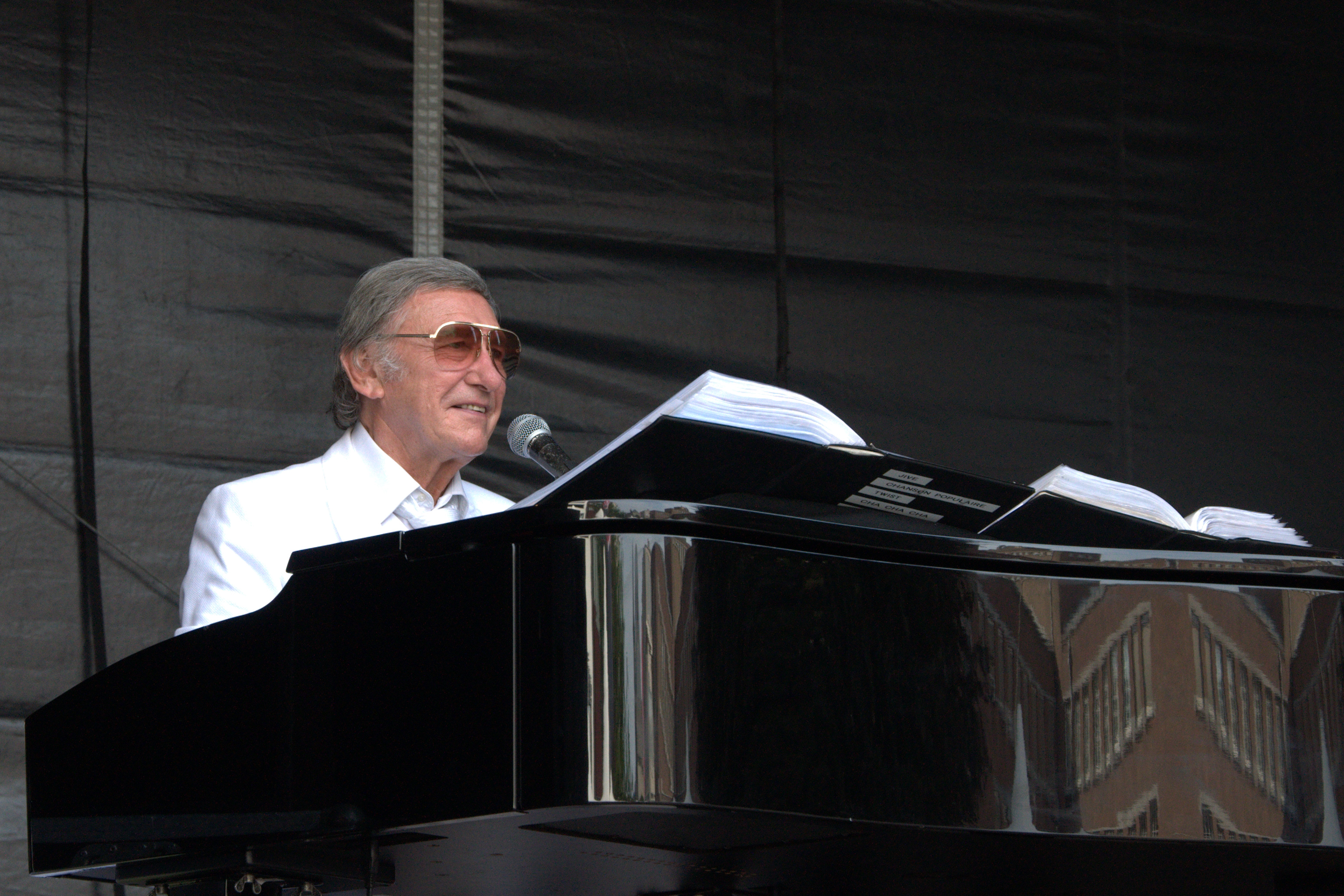 Johan Stollz - Belgisch componist-zanger tijdens de Gentse Feesten 2010